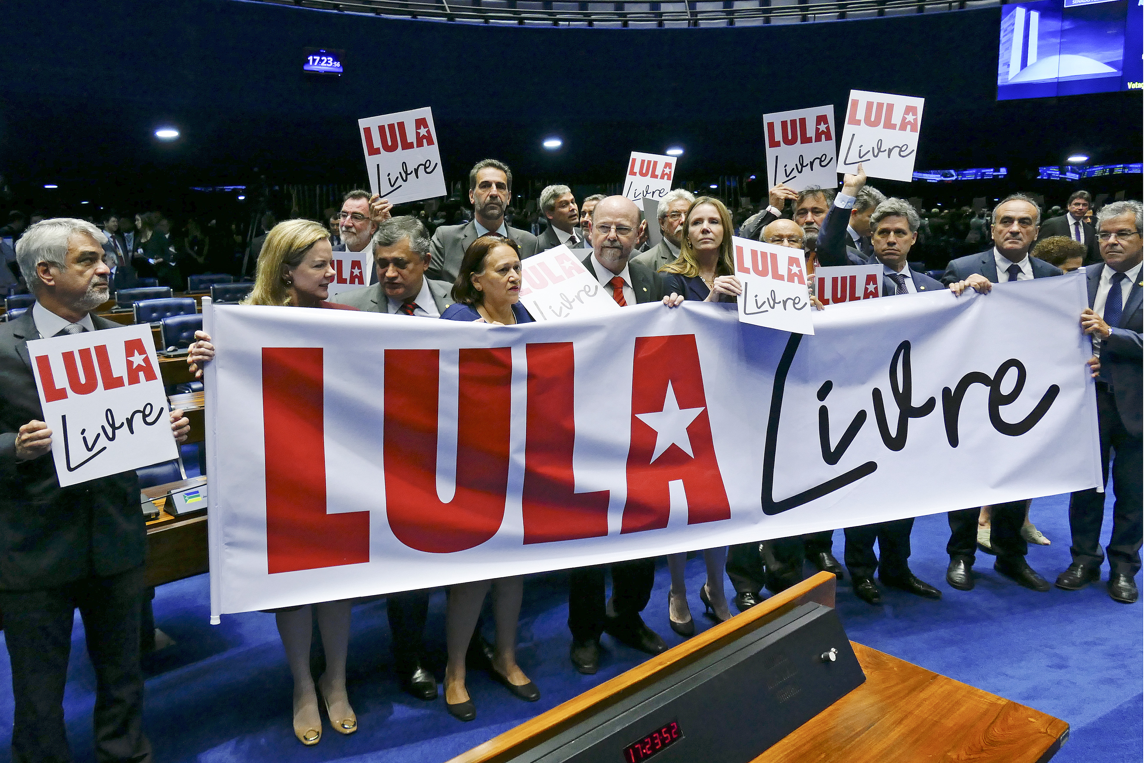 Plenário do Senado Federal durante sessão deliberativa ordinária. Ordem do dia. Parlamentares da oposição fazem ato em defesa do ex-presidente Luiz Inácio Lula da Silva no plenário do Senado. Participam parlamentares do PT, PSOL, PCdoB e PDT. Eles exibem faixa e cartaz que diz: “Lula Livre”. Senadores exibem faixa que diz: " Lula livre". Bancada: senador Lindbergh Farias (PT-RJ); senadora Fátima Bezerra (PT-RN); senadora Gleisi Hoffmann (PT-PR); senadora Vanessa Grazziotin (PCdoB-AM). Foto: Roque de Sá/Agência Senado